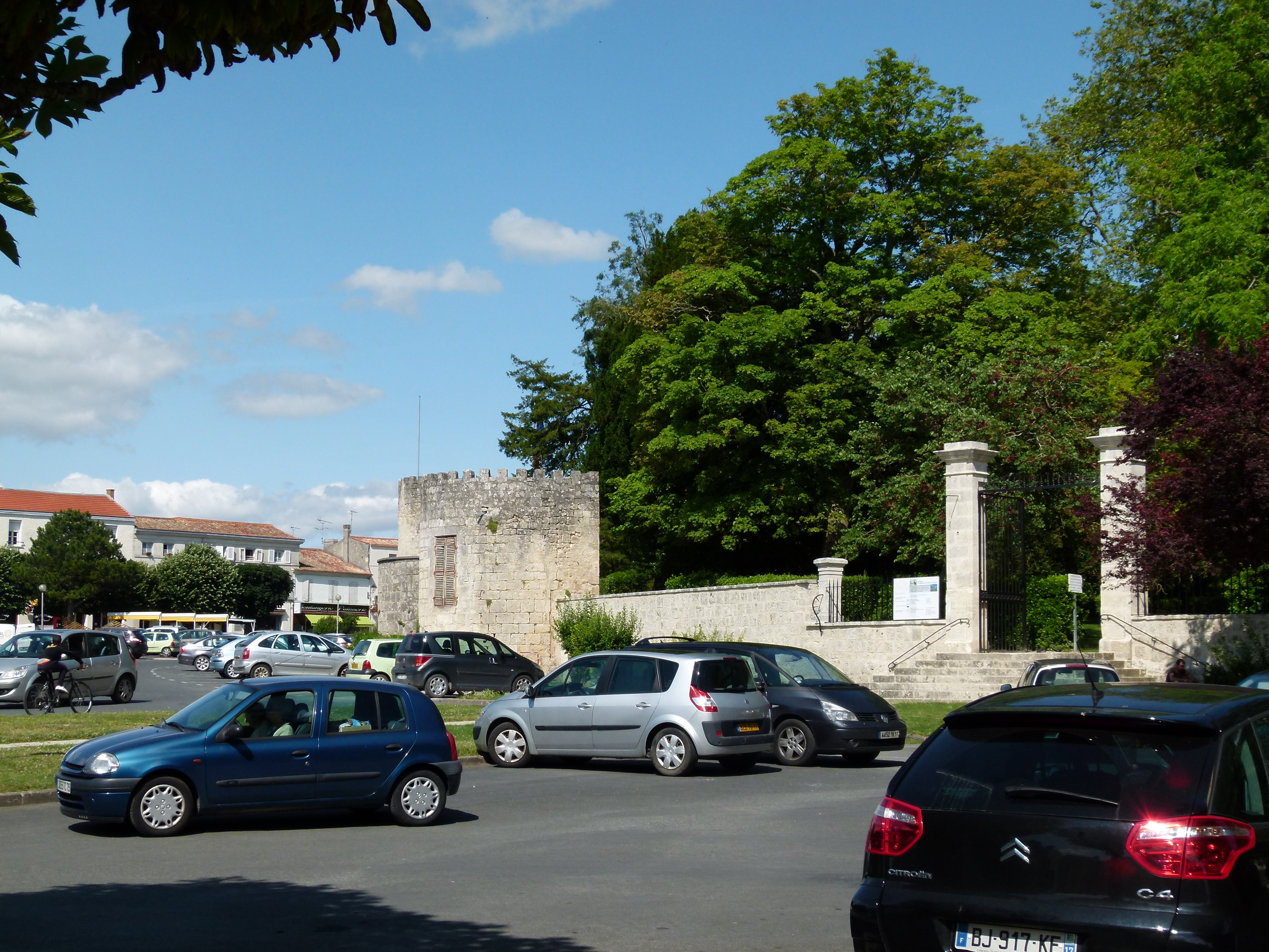 Une autre vue de la place du Château et des remparts ouvrant sur une esplanade utilisée par un grand parking et par les foires de Surgères.